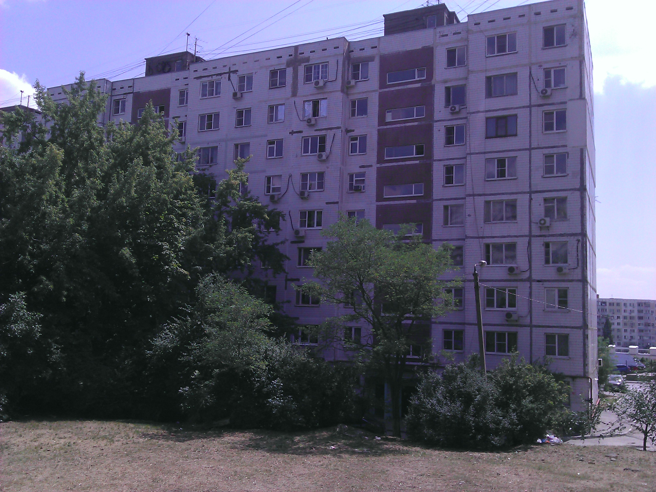 Дом по адресу ул. Комарова, 34. Здесь в 63 квартире 2 августа 1995 года Криштопа был задержан после покушения на убийство.